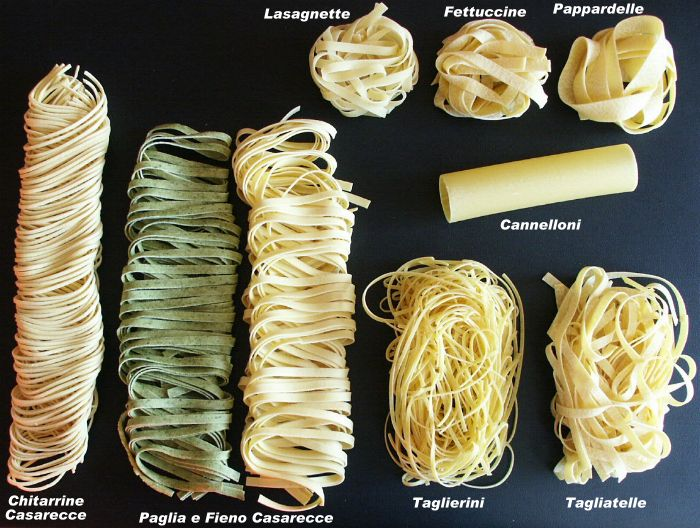 Quelle: selbst fotografiert, 10/2004